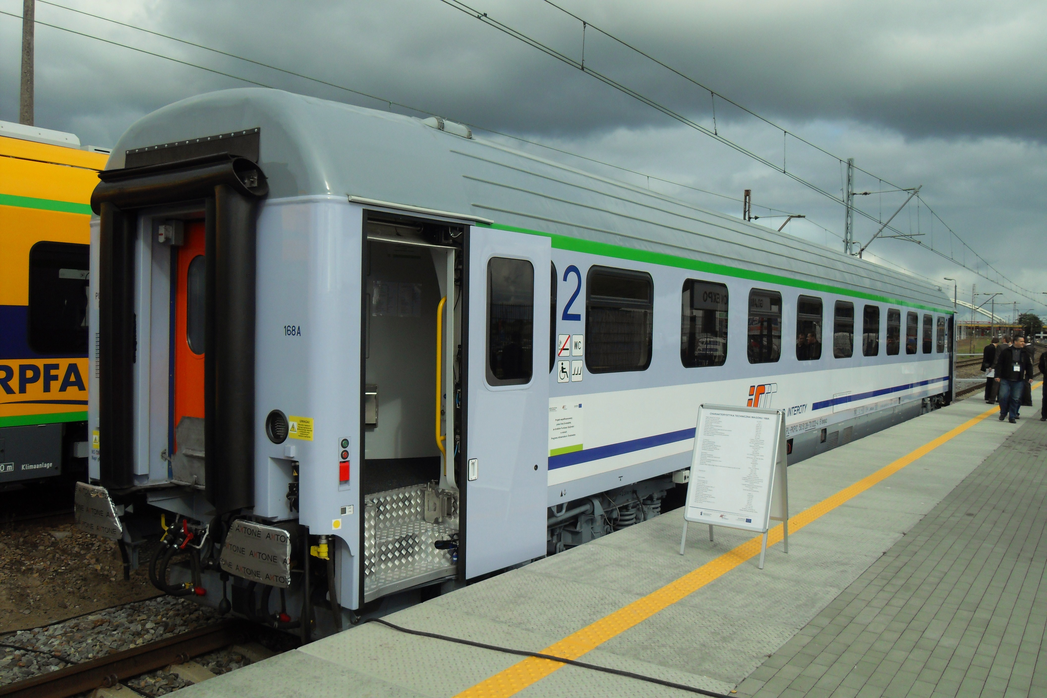 Gdańsk Letnica. TRAKO 2013, wagon 168A (modernizacja Newag).